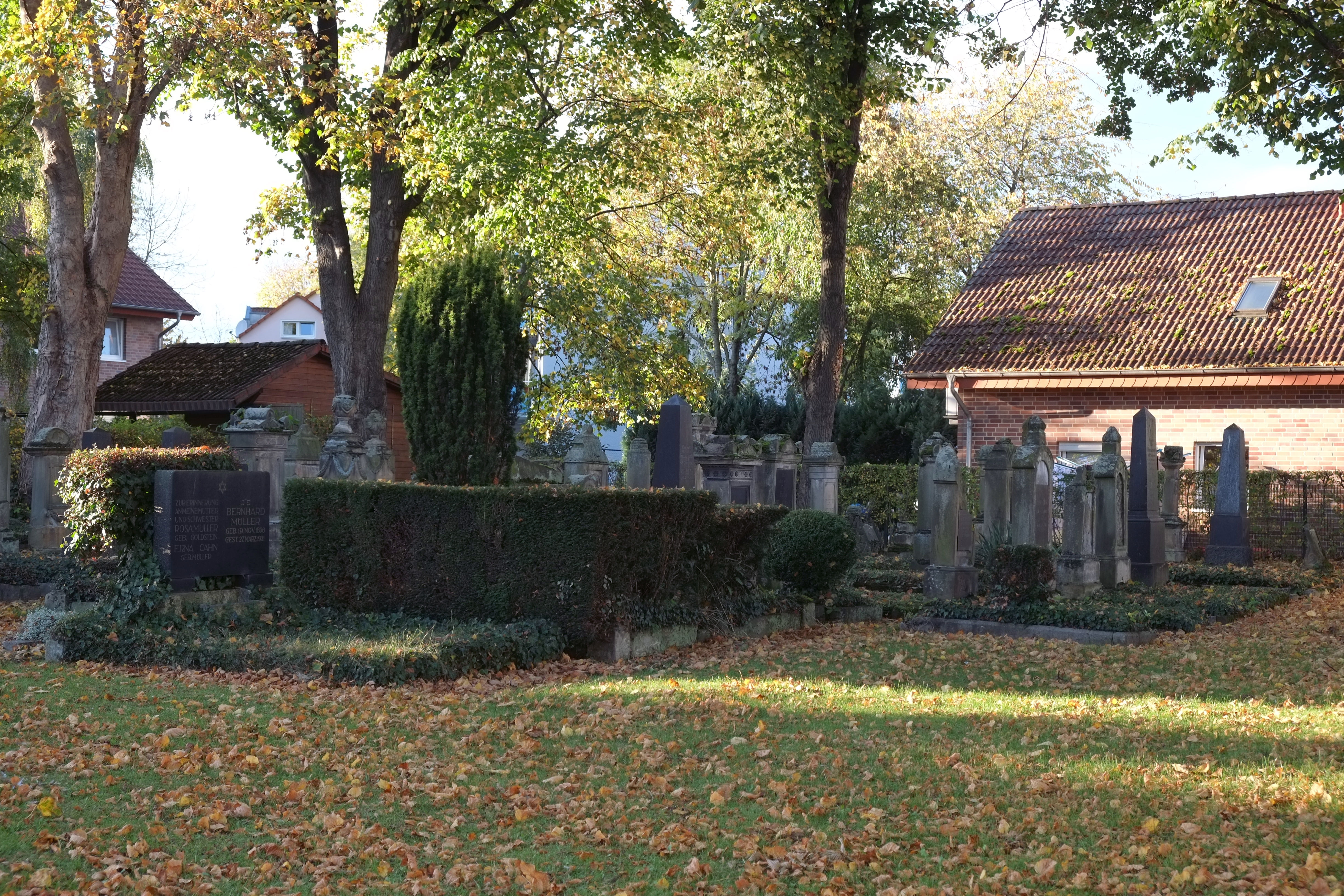 Jüdischer Friedhof in Geseke im Kreis Soest (Nordrhein-Westfalen/Deutschland)